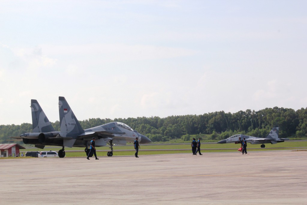 Satu Flight pesawat tempur Sukhoi jenis SU-30 MK2 kembali ke homebase nya di Skadron Udara 11 Lanud Hasanudin Makasar, setelah melaksanakan Latihan Pertahanan Udara Nasional Perkasa B tahun 2013 di wilayah Kalimantan Timur